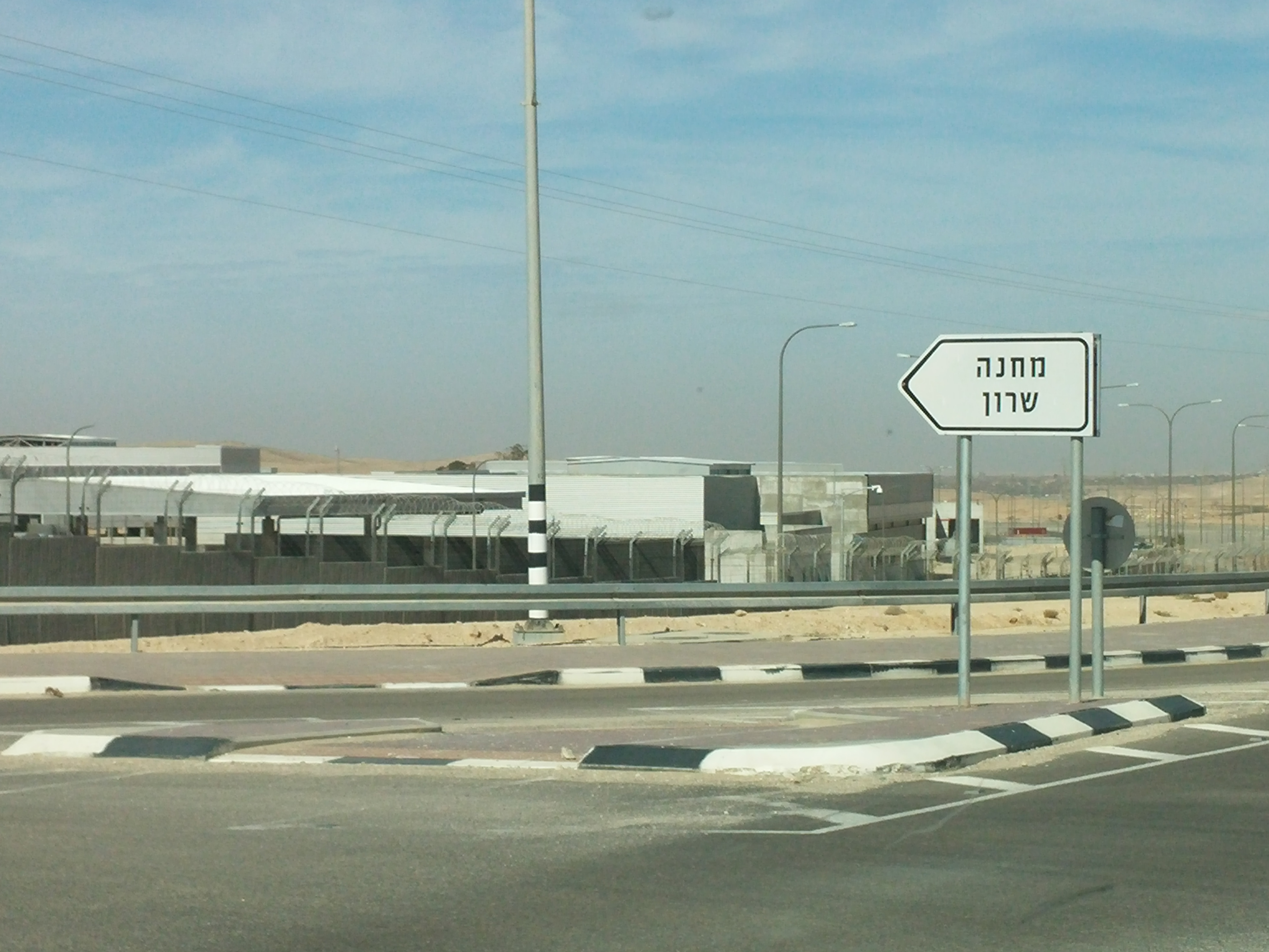 מחנה שרון, עיר הבה"דים